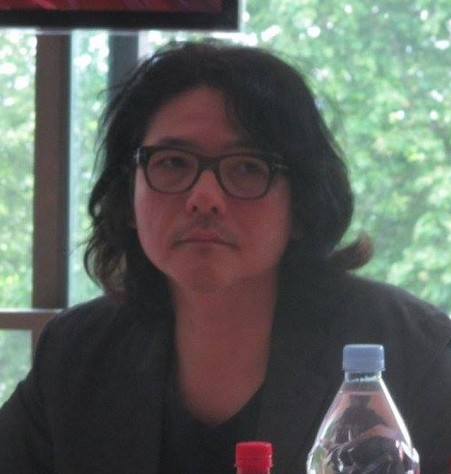 Shunji Iwai au Festival international du film d'animation d'Annecy 2015